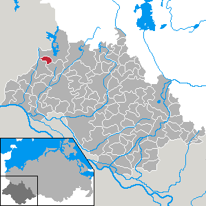 Lüttow-Valluhn in Mecklenburg-Vorpommern - district Ludwigslust